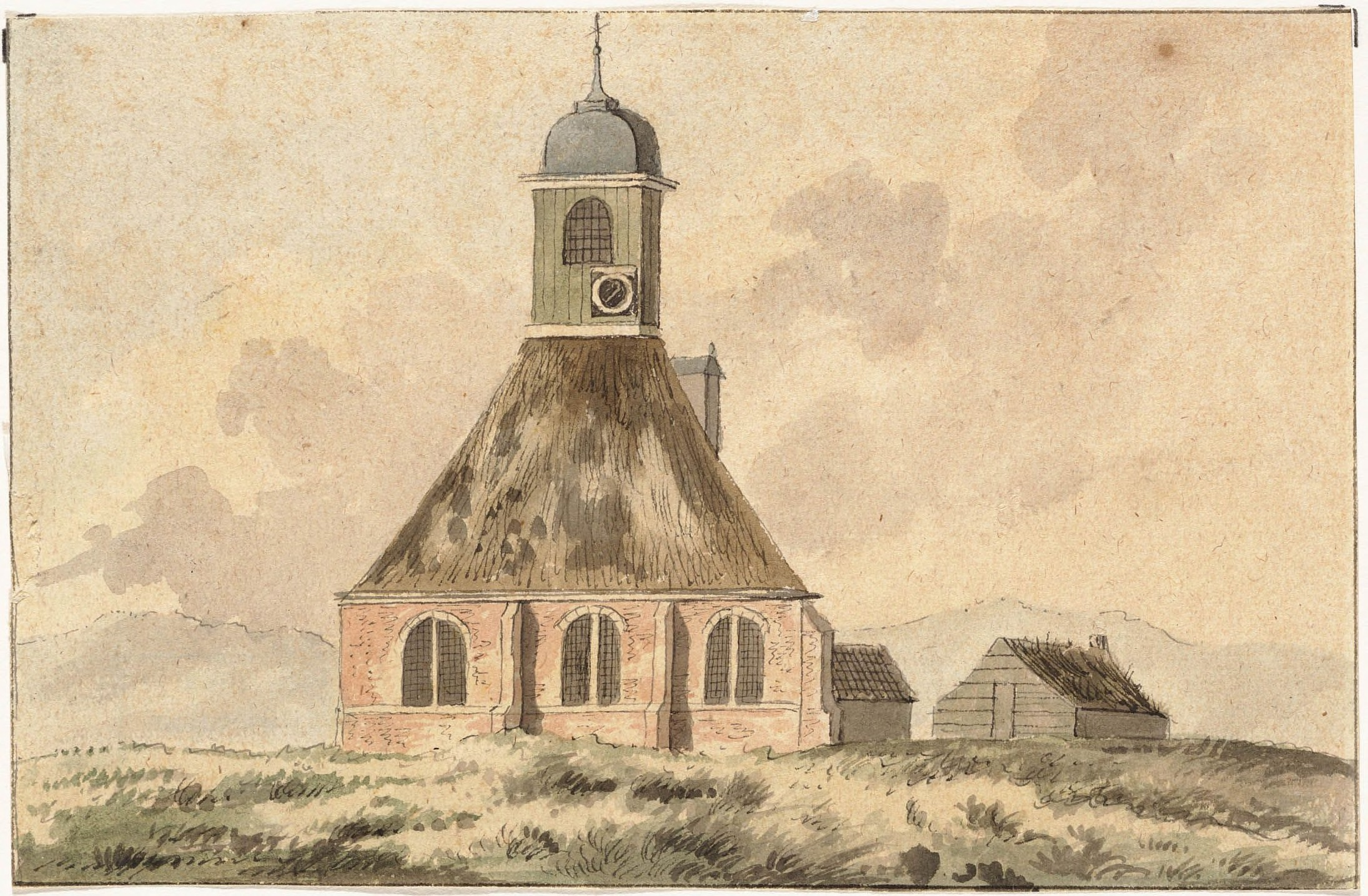 "Kerk te Kamp, 1795", de kerk met rechts een laag schuurtje en op de achtergrond de duinen.